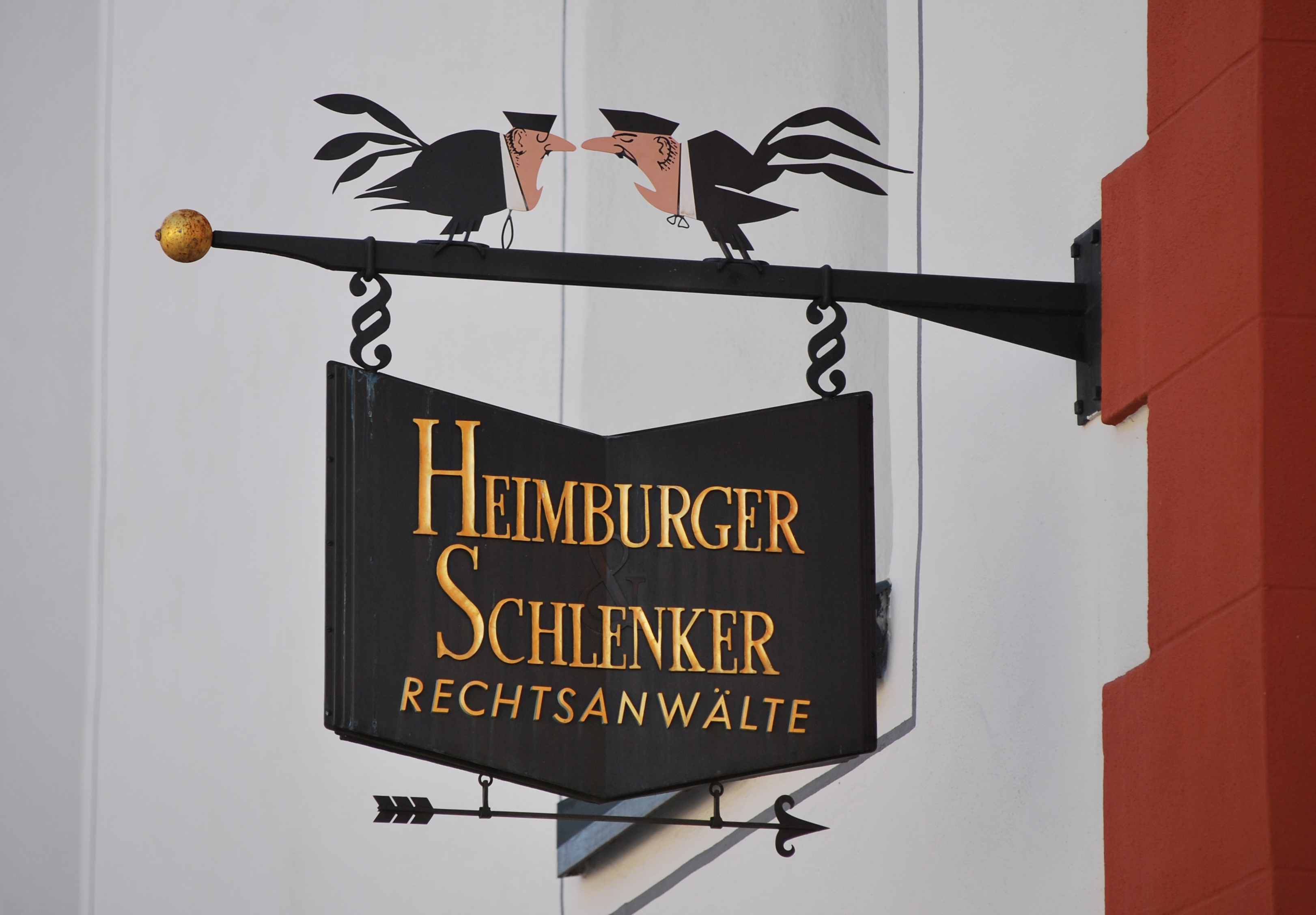 Nasenschild in Villingen-Schwenningen